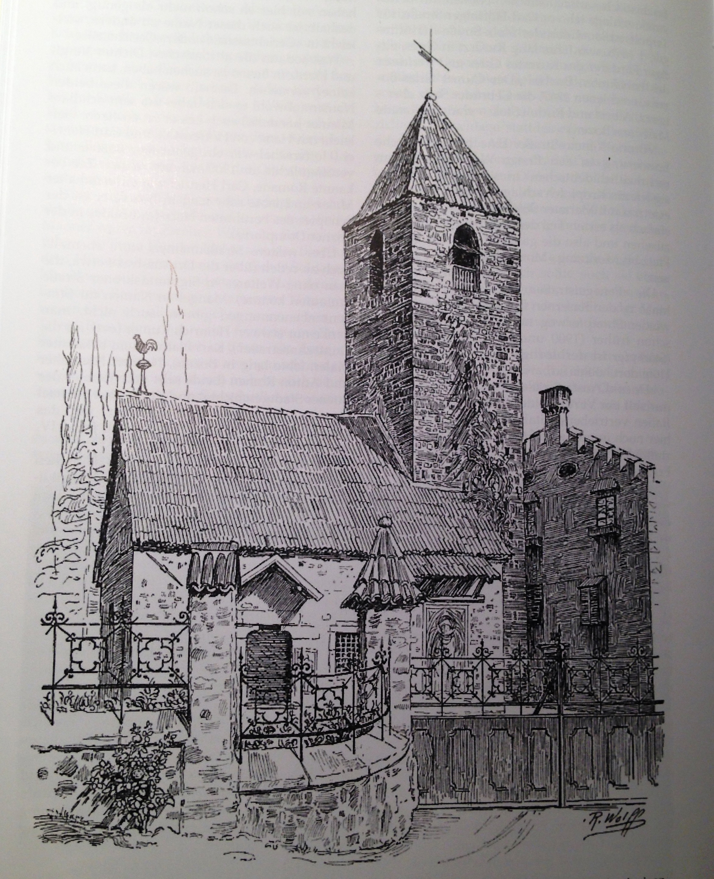 Zeichnung der Bozner St.-Oswaldkirche von Richard Wolff (um 1912)